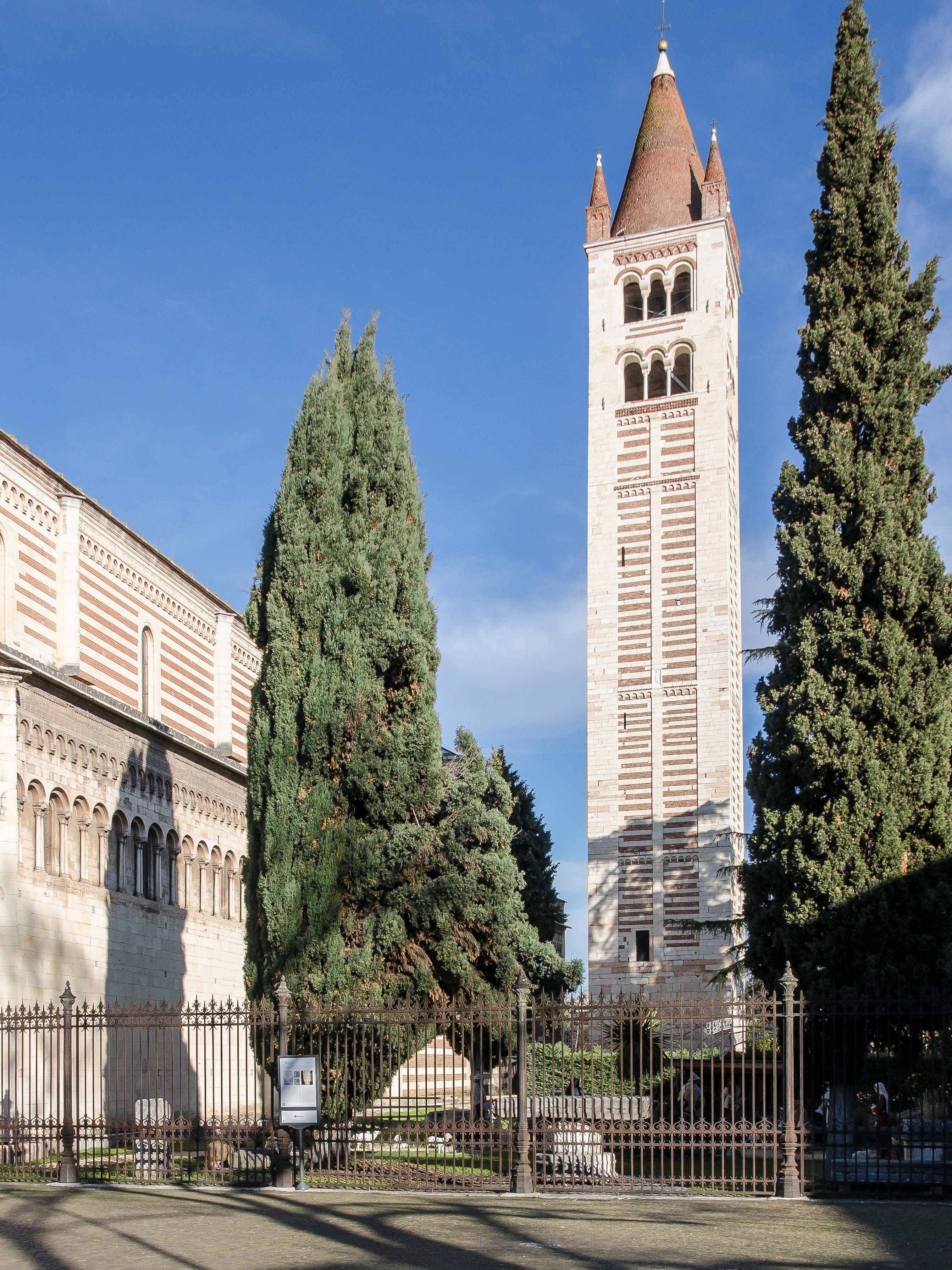 Campanile